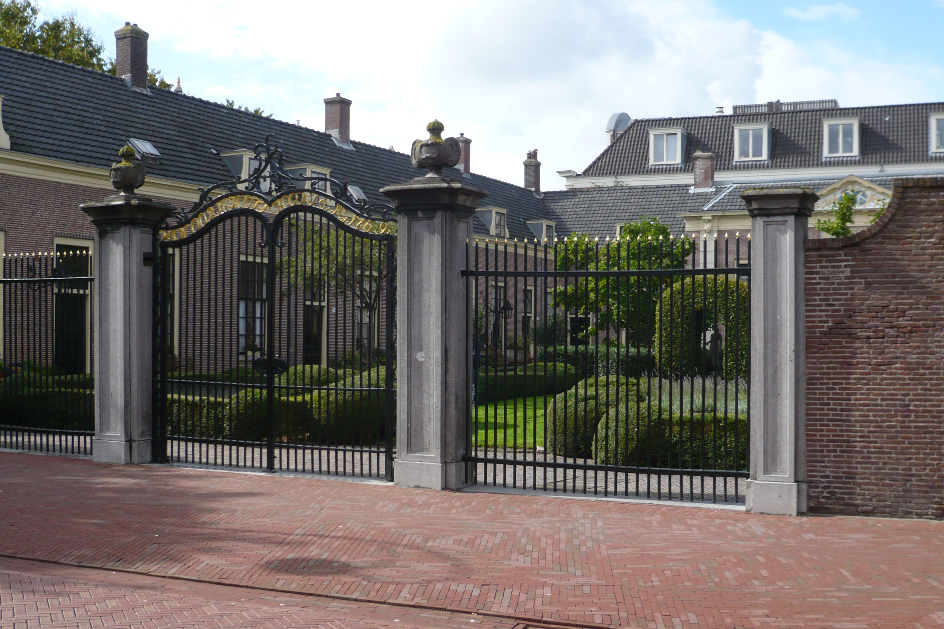 Hofje van Oorschot, Kruisstraat 44, Haarlem. Op het hek staat VAN OORSCHOTS HOFJE Ao 1769.